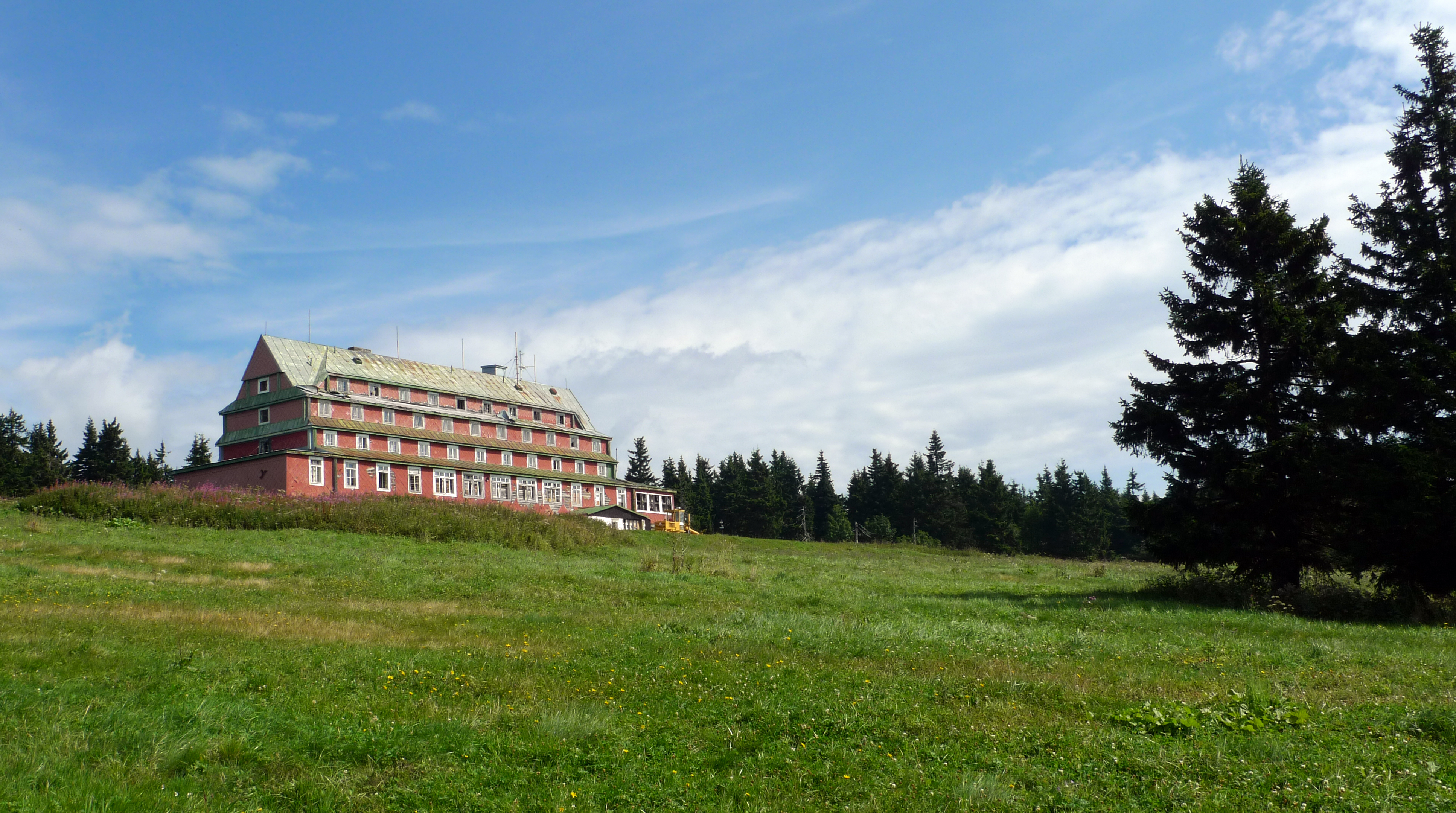 Sokolská bouda z Volské louky